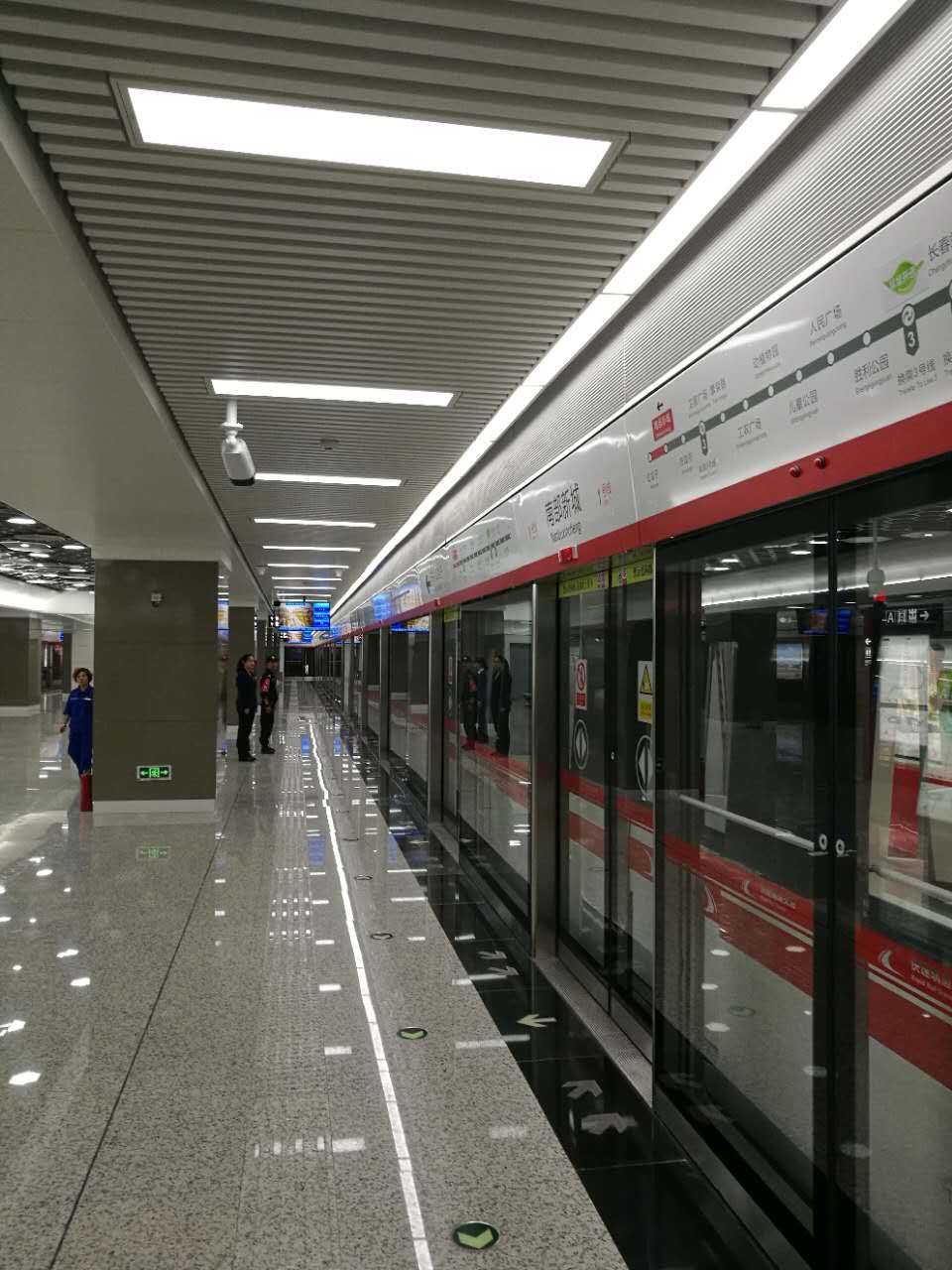 长春地铁南部新城站站台